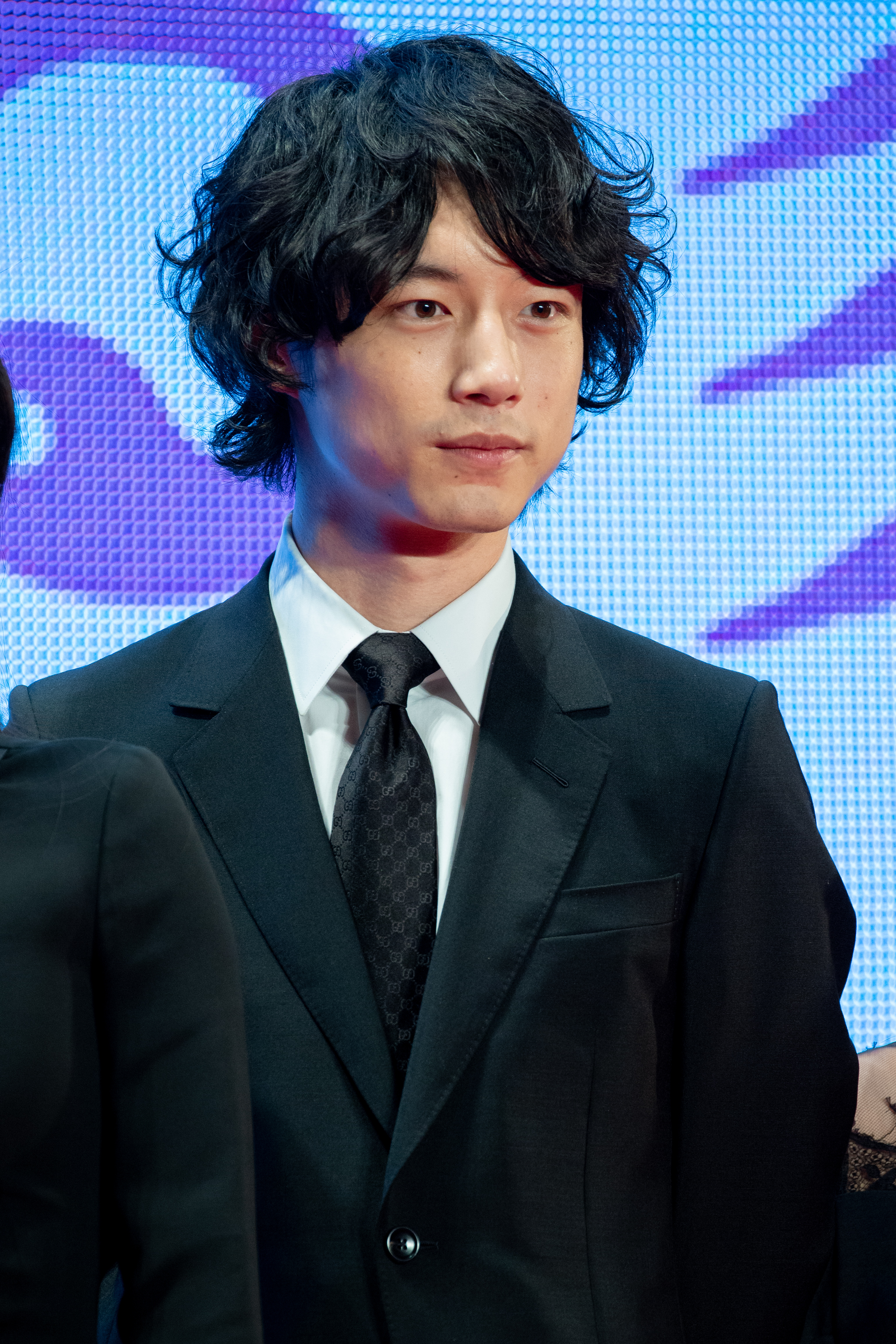 第30回 東京国際映画祭 人魚の眠る家 レッドカーペットイベント 坂口健太郎